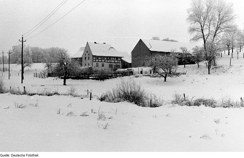 Original image description from the Deutsche FotothekKlipphausen-Lampersdorf. Obermühle, Ansicht